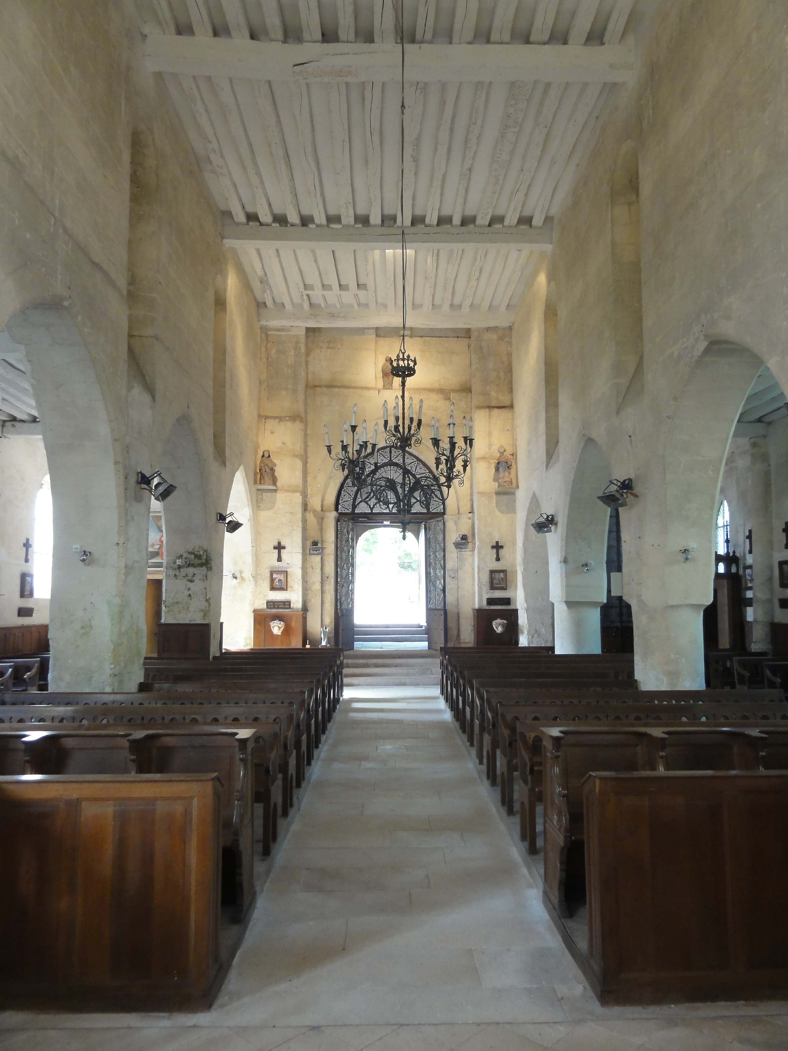 Intérieur de l'église - voir titre.